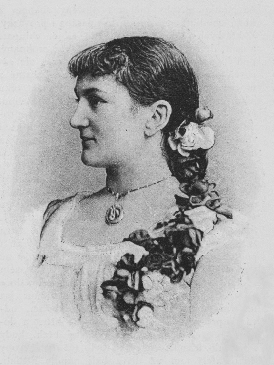 Klementina Kalašová, fotografie Jana Mulače, časopis Světozor, ročník 18/1884, číslo 27, strana 324.